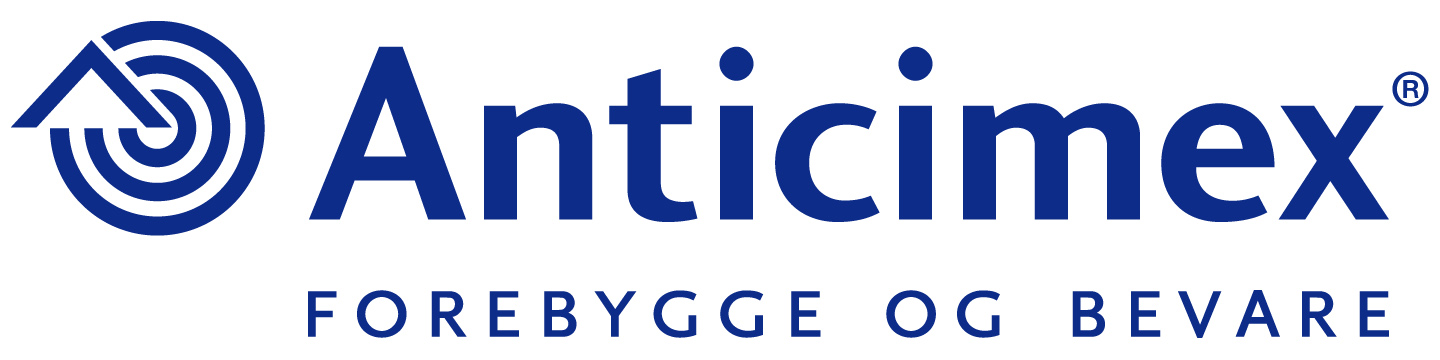 Anticimex Norge Logo